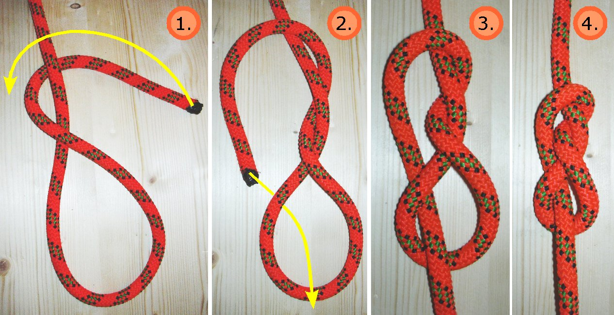 Neunerknoten